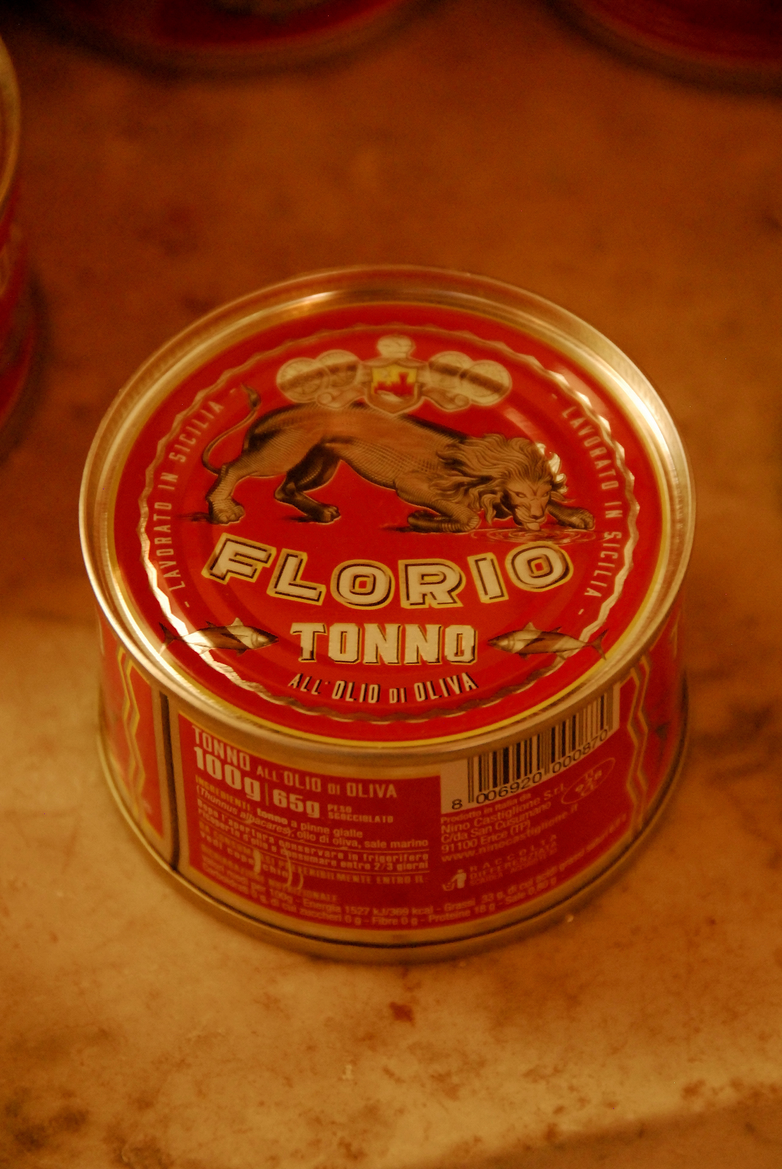 Palermo, ITA